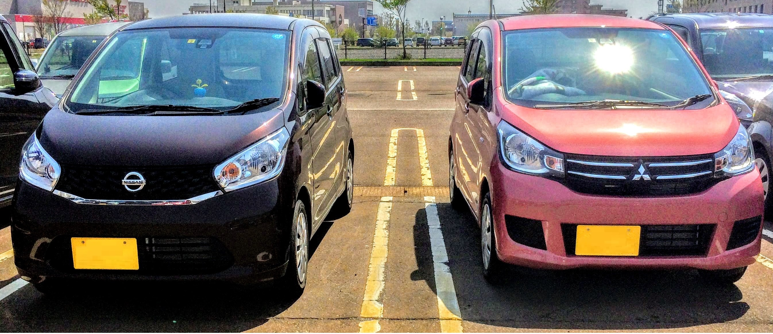 三菱EKワゴンと日産デイズ